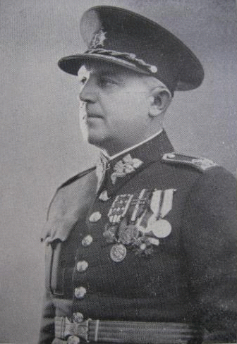 František Kravák (* 10. září 1889 Mostkovice – 24. května 1943 Berlín – Plötzensee) byl důstojníkem československých legií, československé armády a významnou osobností protifašistického odboje v řadách Obrany národa.